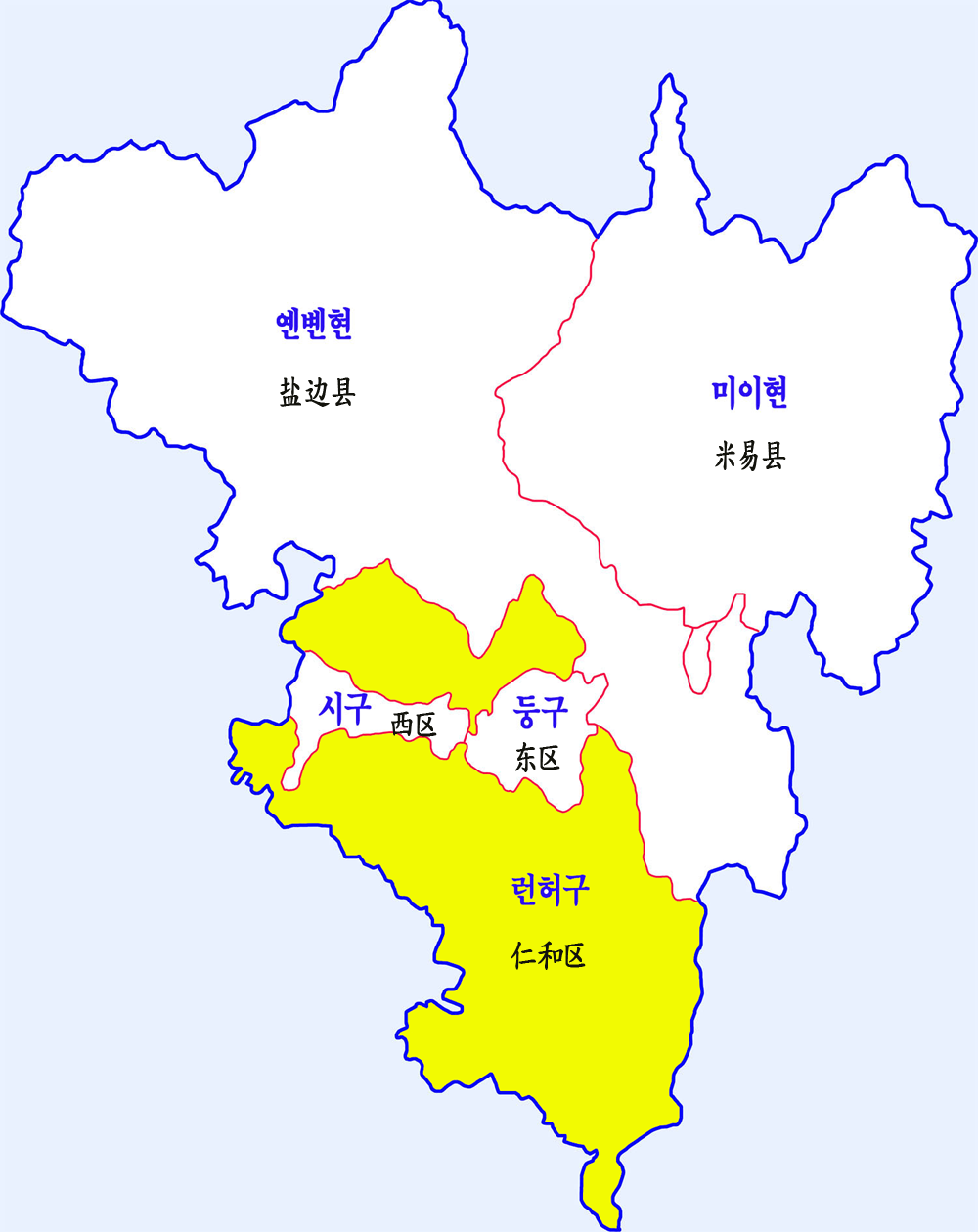 판즈화시 행정구역